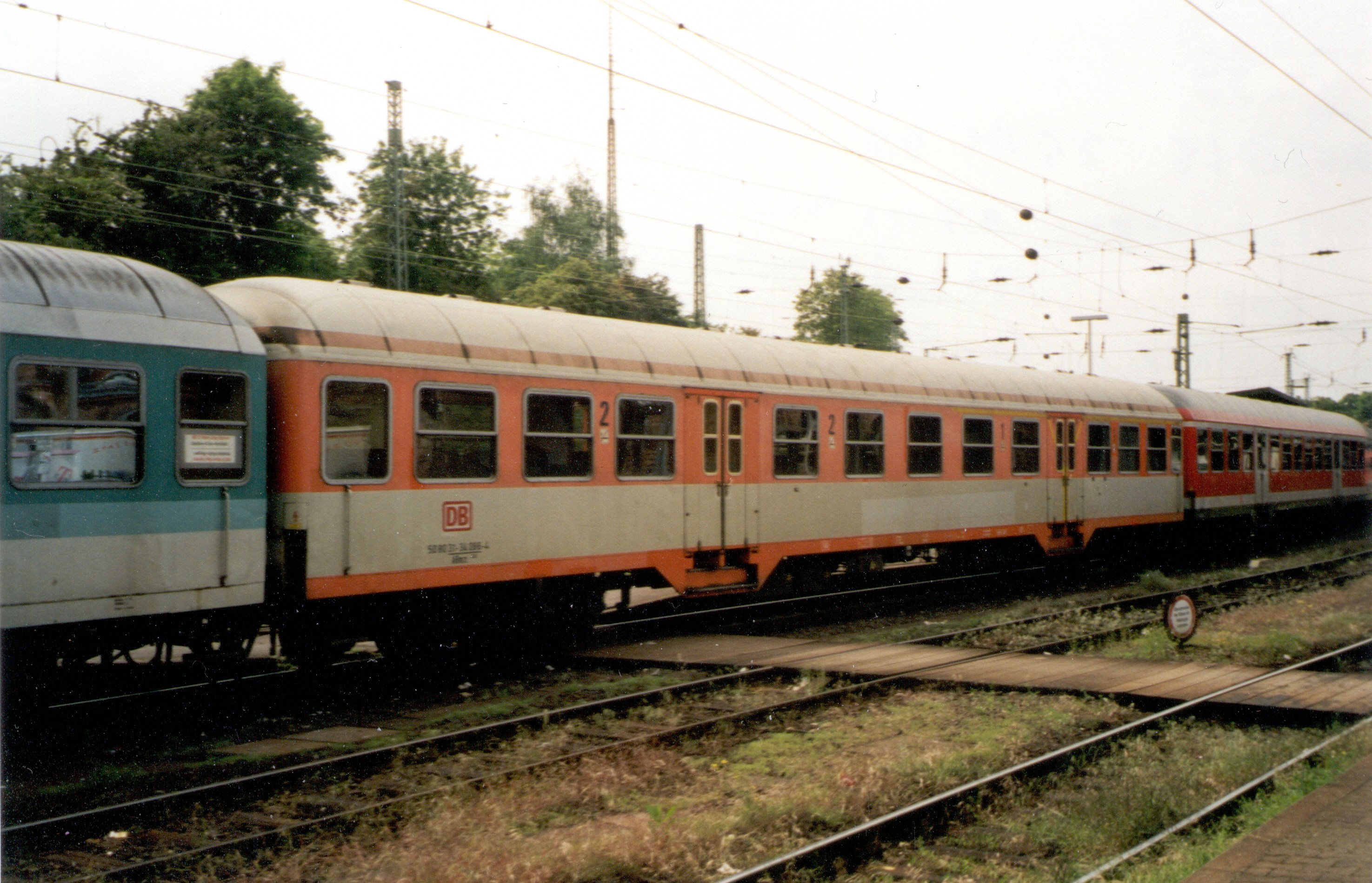 ABnrz 400 am 25.05.1999 in Gießen, RE 3322 Gießen - Krefeld